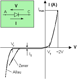 Tret de ca::es:Imagen:Diodo - curva característica (Sockley).png: "Original de Enciclopedia Libre, © ca::es:Usuario:Willy"